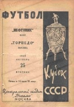 Кубок СССР 1949. 1-4. 25 октября 1949. Торпедо (Москва) - Нефтяник (Баку)